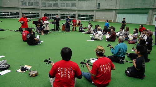 沖縄県うるま市具志川ドームにて100人で大合唱 てぃんさぐぬ花